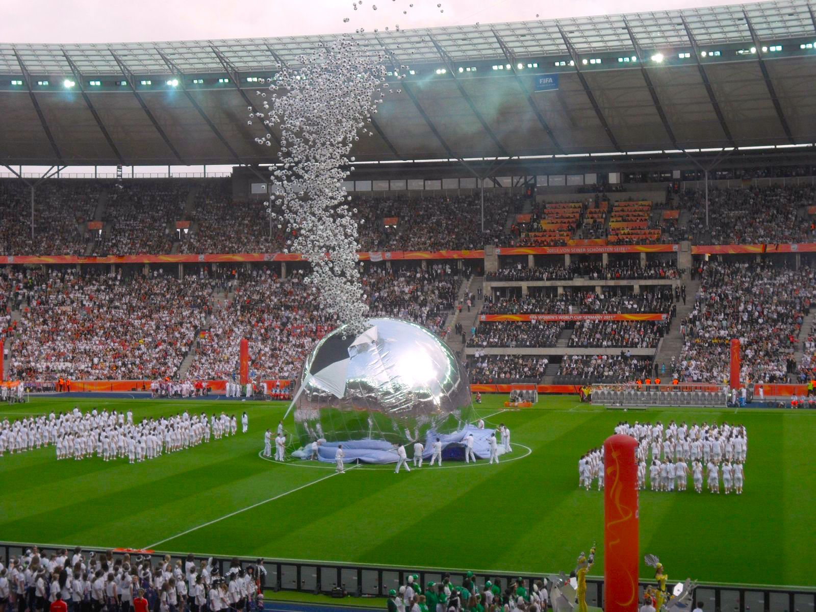 FIFA Women's World Cup 2011 in Deutschland: Eröffnungsfeier im Olympiastadion Berlin vor dem Auftaktspiel in der Gruppe A Deutschland gegen Kanada.